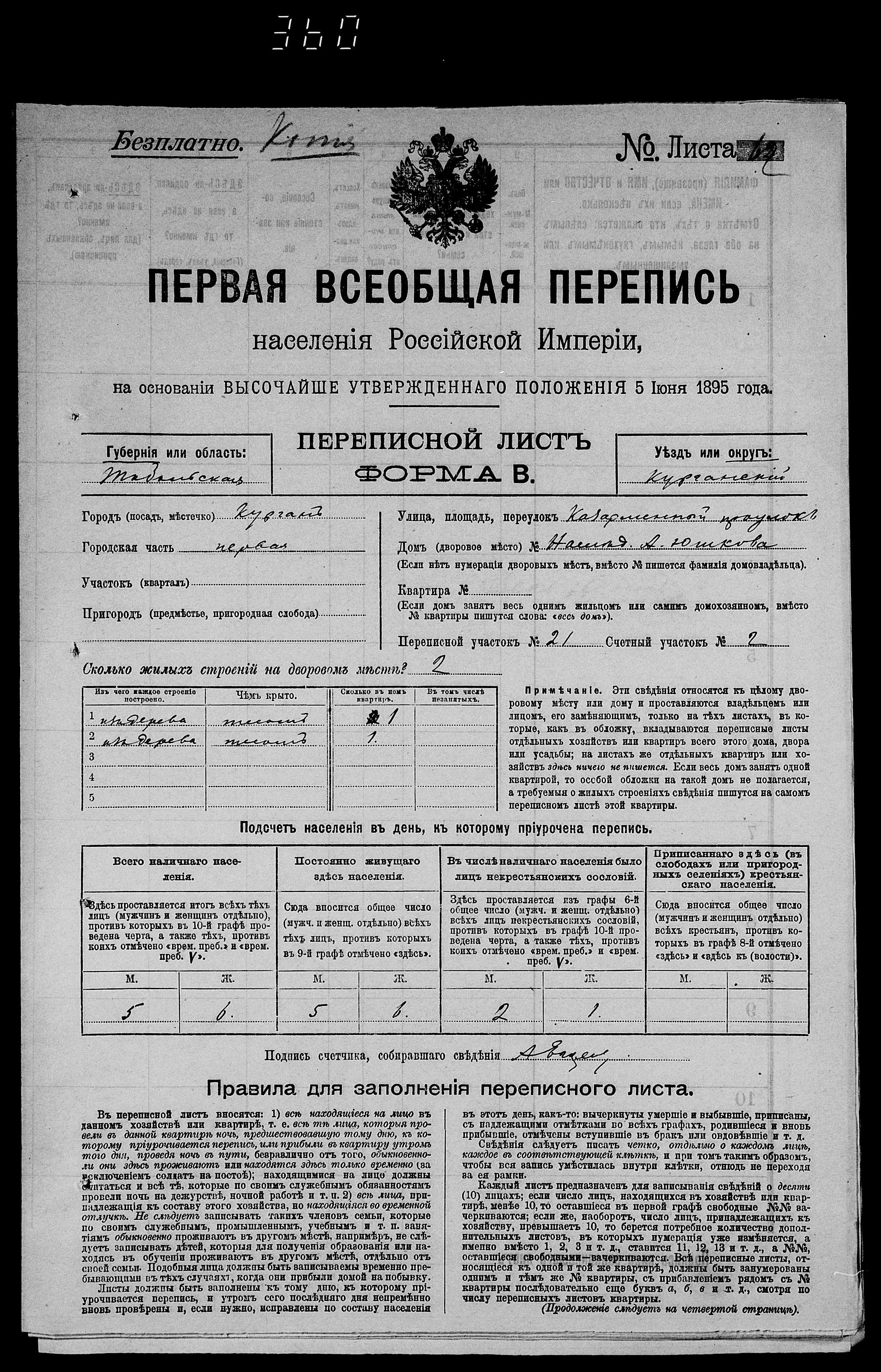 Перепись 1897, Тобольская губерния, г. Курган, Казарменный проулок, дом Юшкова